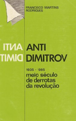 Digitalização de obra esgotada há muitos anos, sem restrição legal para a sua reprodução.